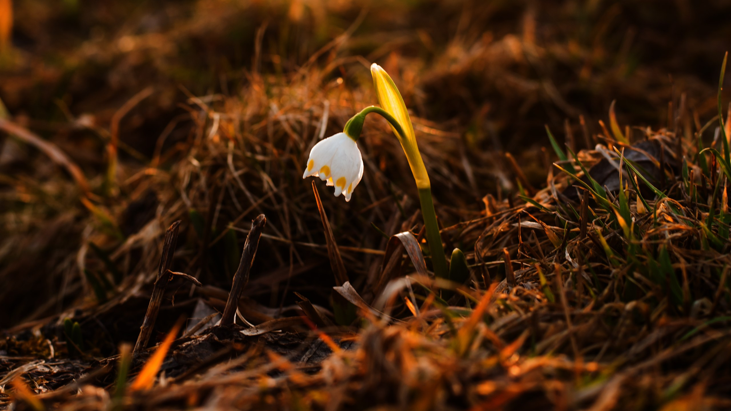 Перший символ приходу справжньої весни - Білоцвіт (карпатський підсніжник)